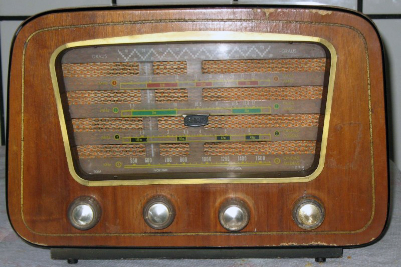 foto do rádio capelinha da semp. Um PT-76 ou "capelinha" de 1970.